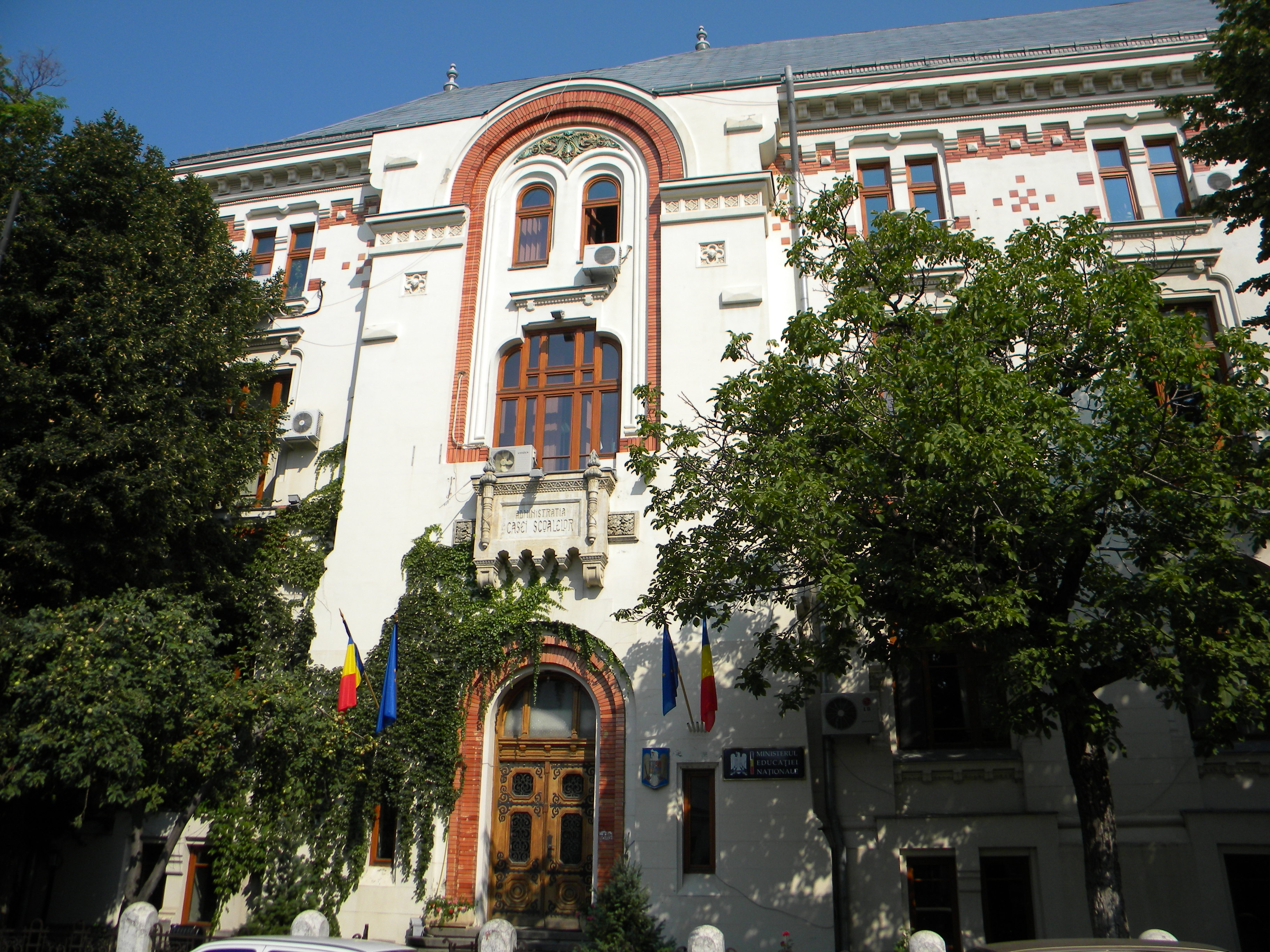 Palatul Ministerului Cultelor si Artelor azi Ministerul Educatiei si Cercatarii, Str. Berthelot, Bucuresti sect. 1